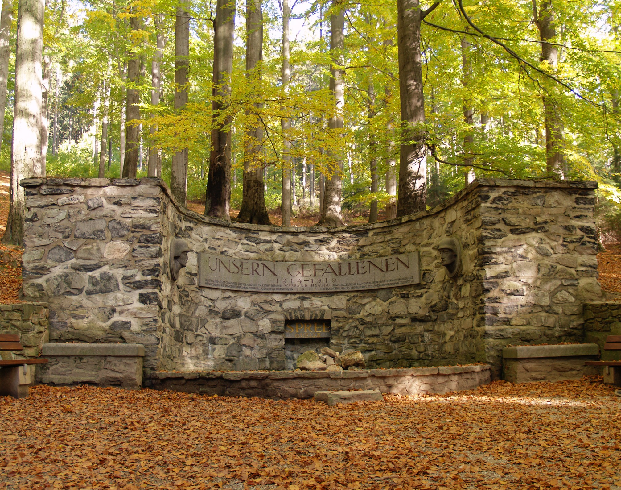 Quelle der Spree auf dem Kottmar